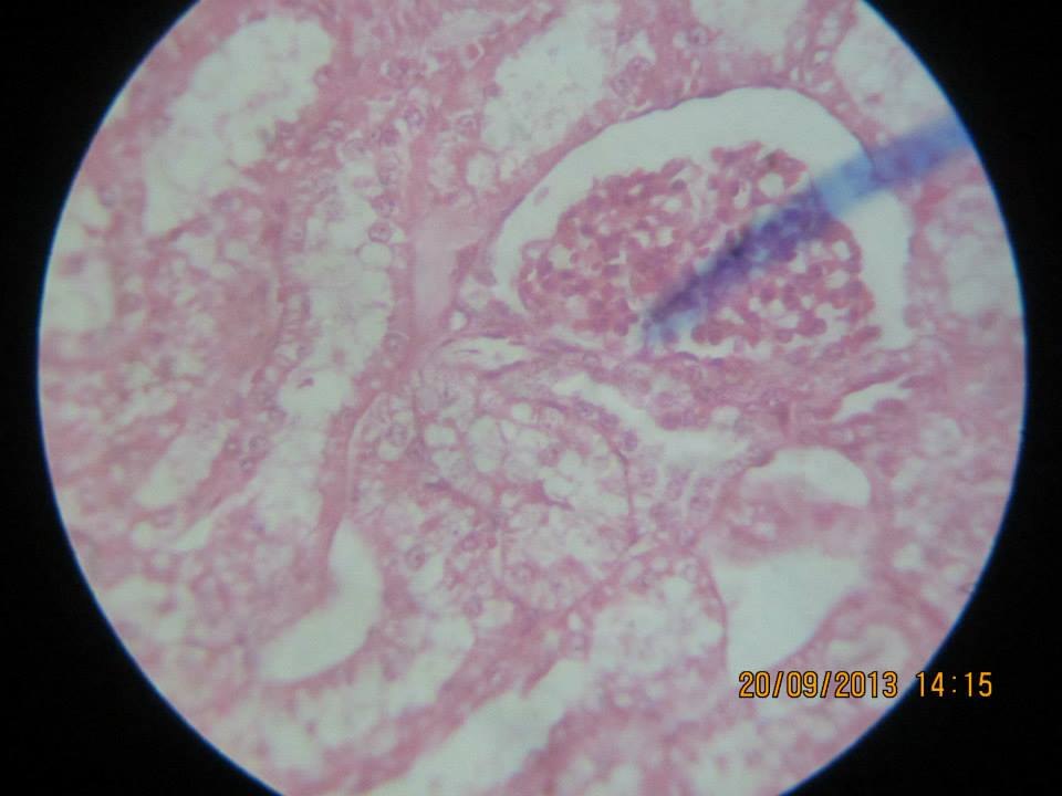 Tiêu bản Thận thổ dưới kính hiển vi quang học vật kính 40x